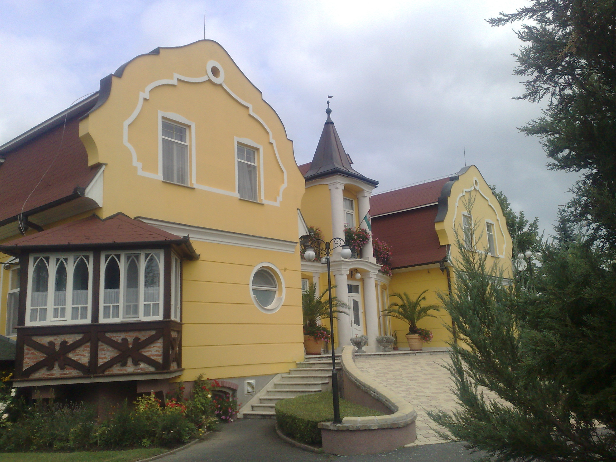 Kastélyszálló Sobor községben